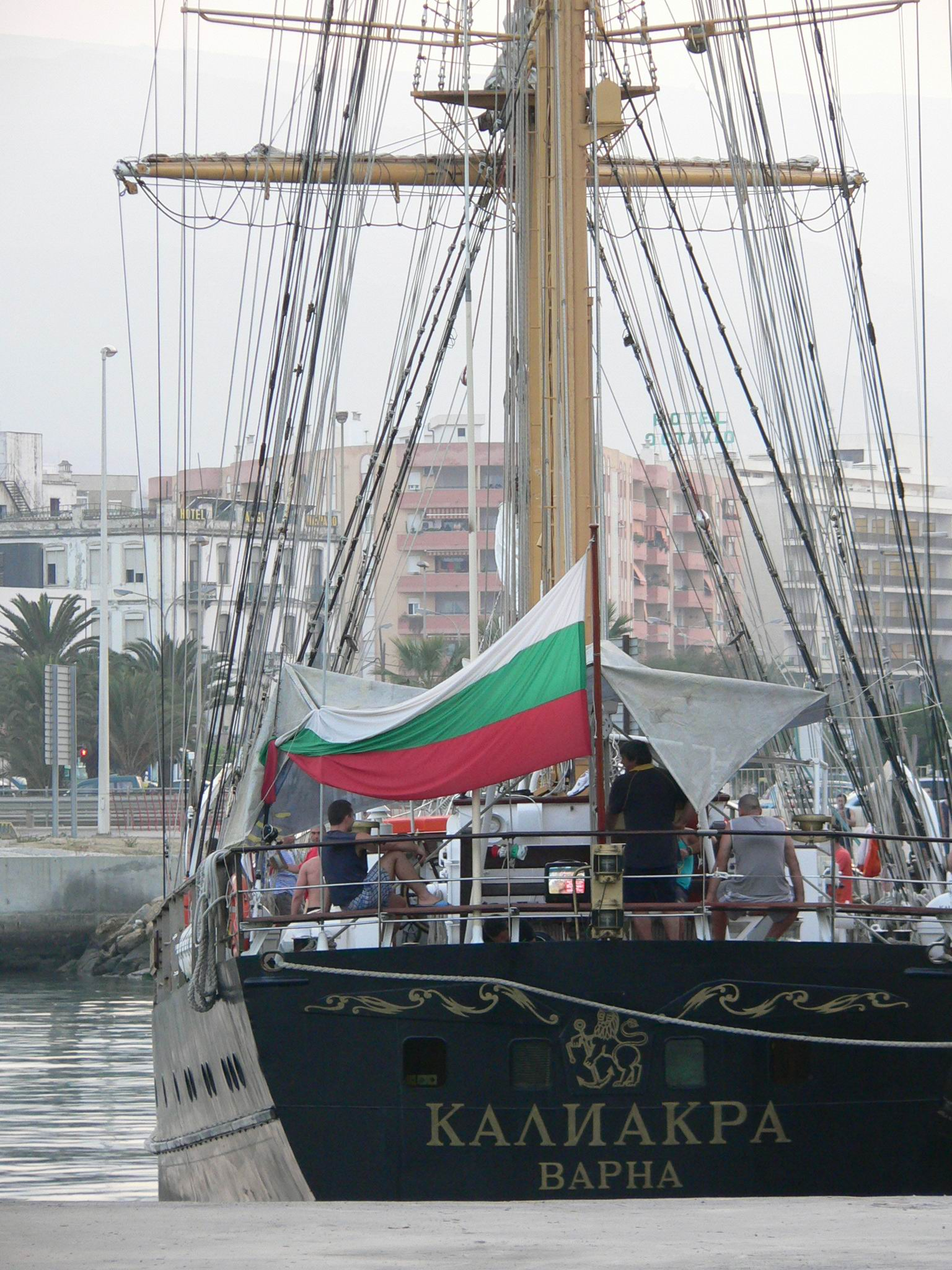 Kaliakra - Bulgarian Tall ship in Algeciras, Spain